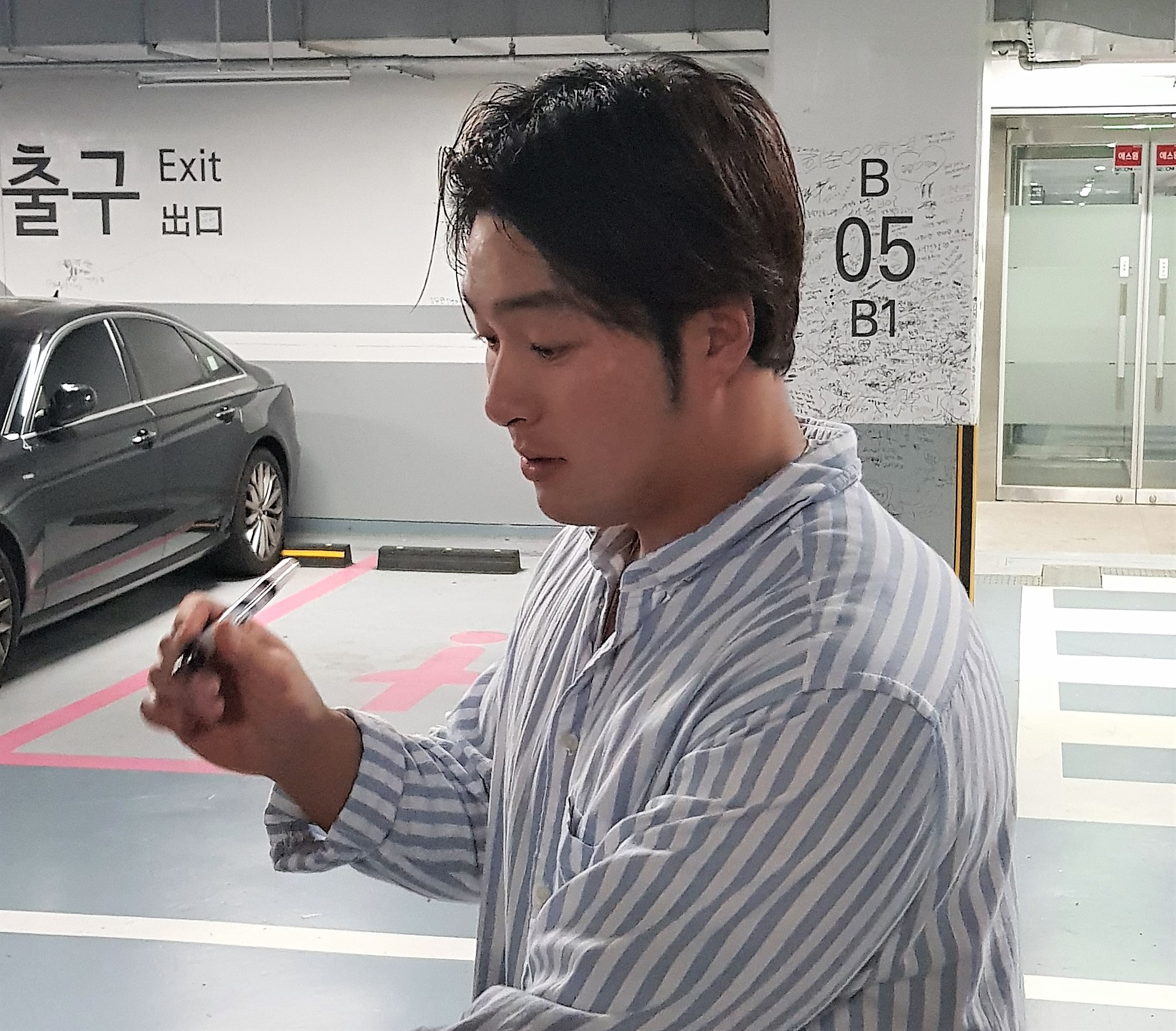 넥센 히어로즈의 박병호 선수